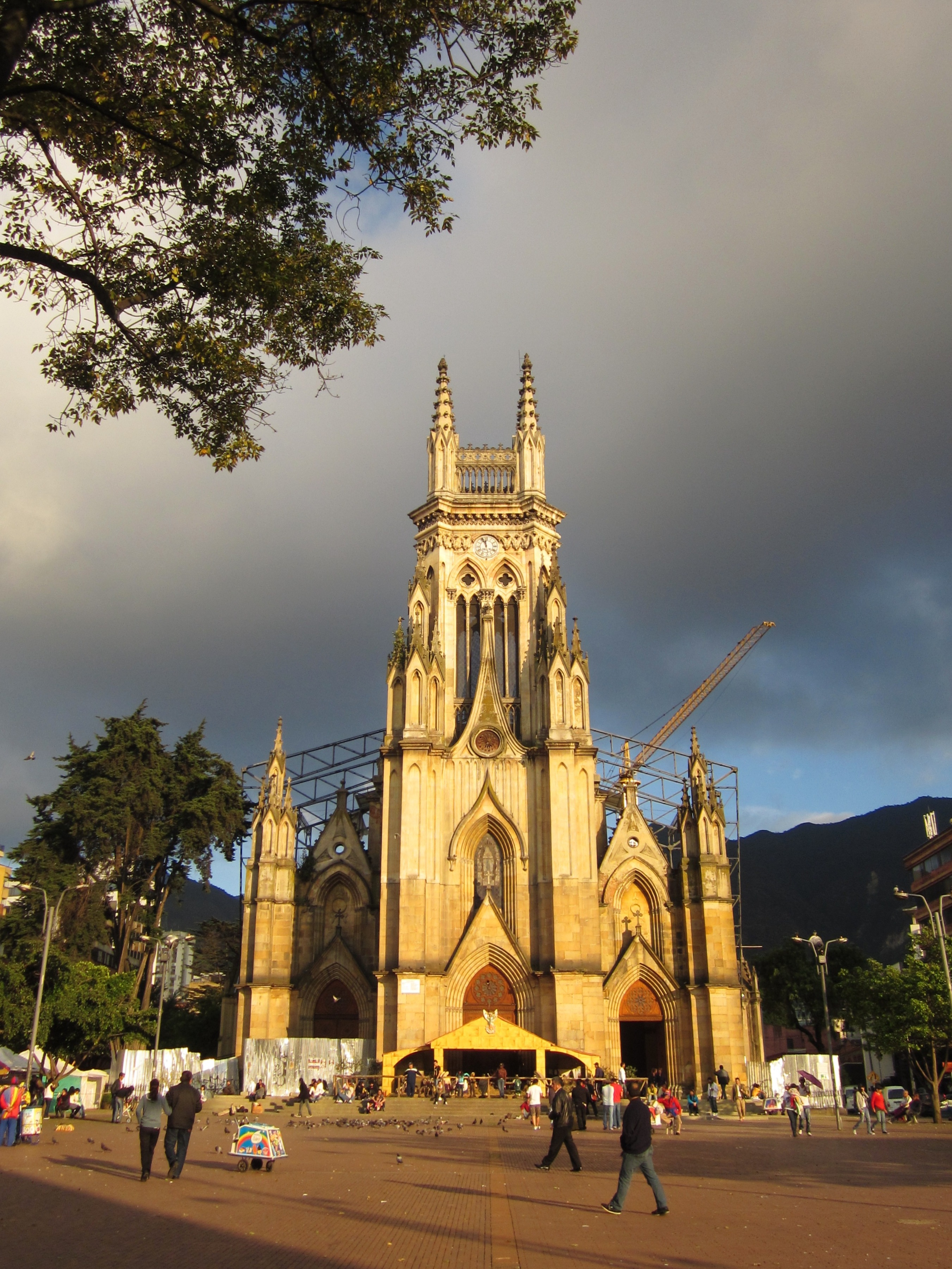 Iglesia de Lourdes en Bogotá. Localidad de Chapinero.